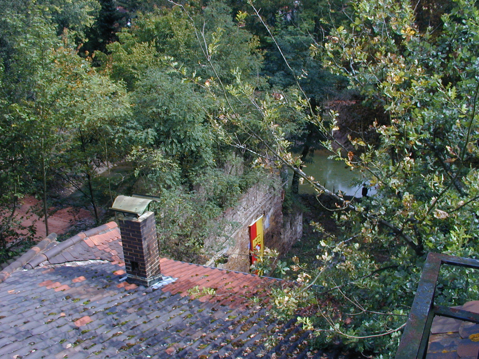 Wasserschloss Sommerau Blick auf Mauer und Brücke.